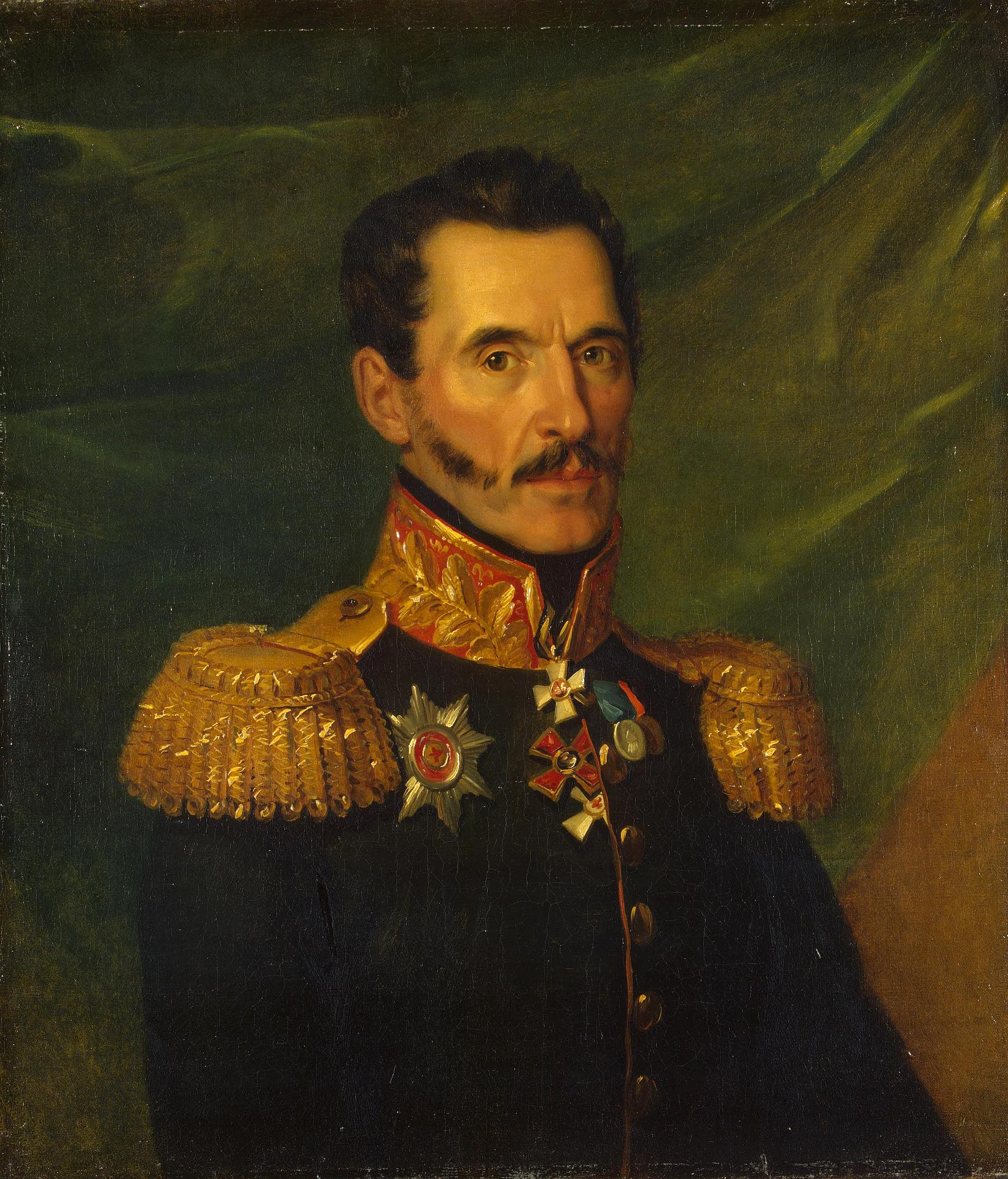 Stepan Yakovlevich Repninsky 1-st (27.12.1773 – 21.06.1851) russian general